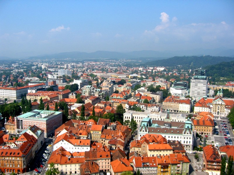 Ljubljana (pogled z gradu) v smeri Viča. Foto AndrejJ avgust 2004